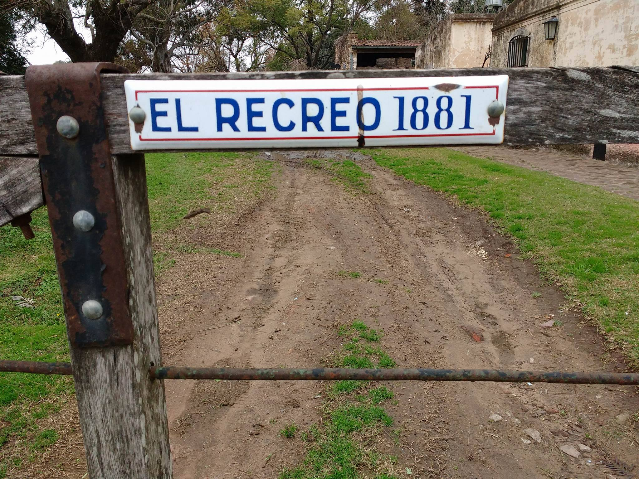 Portada antigua